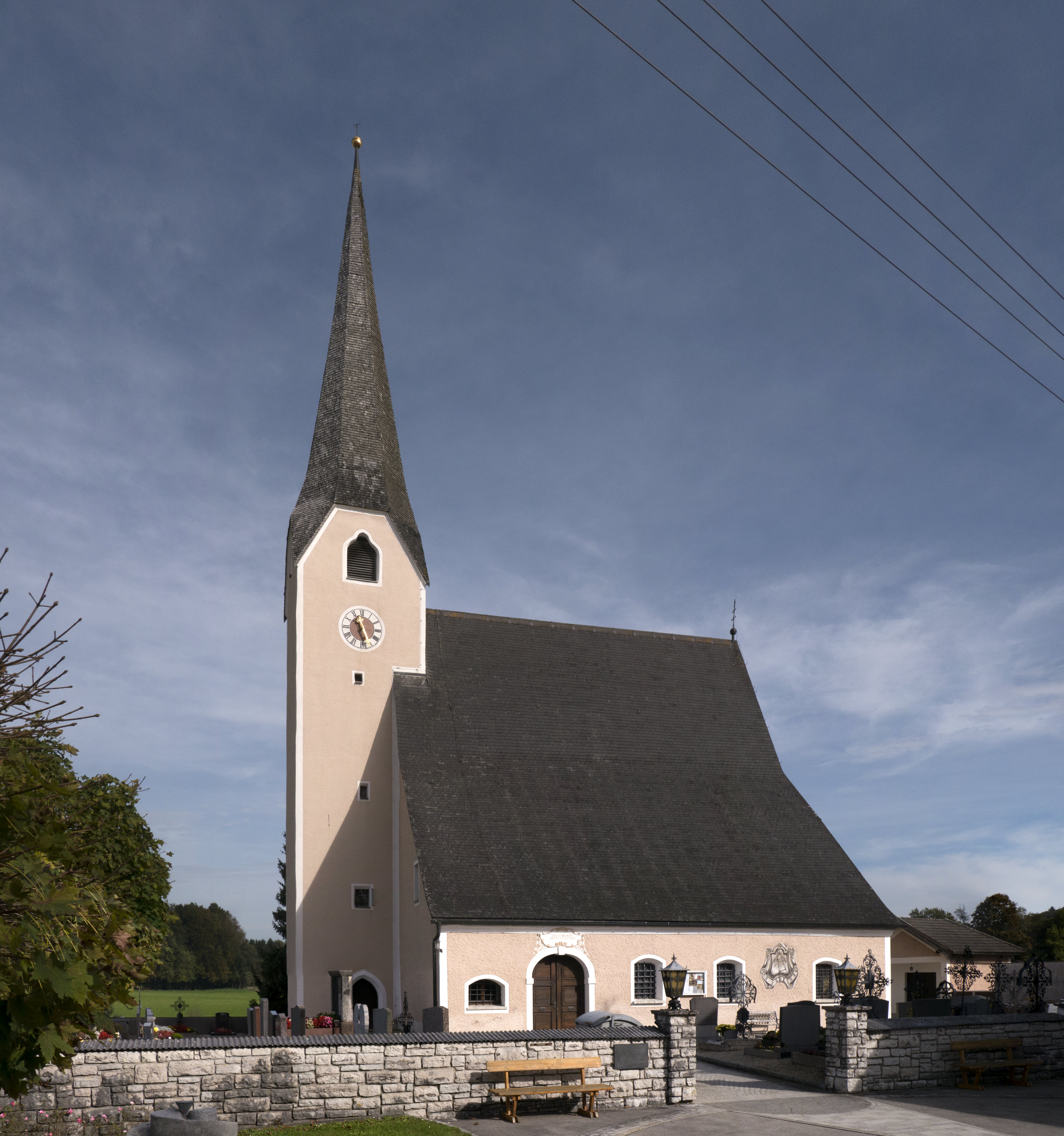 Kath. Pfarrkirche hll. Simon und Judas sowie Friedhof